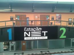 Vista da fachada do Estação NET Barra Point